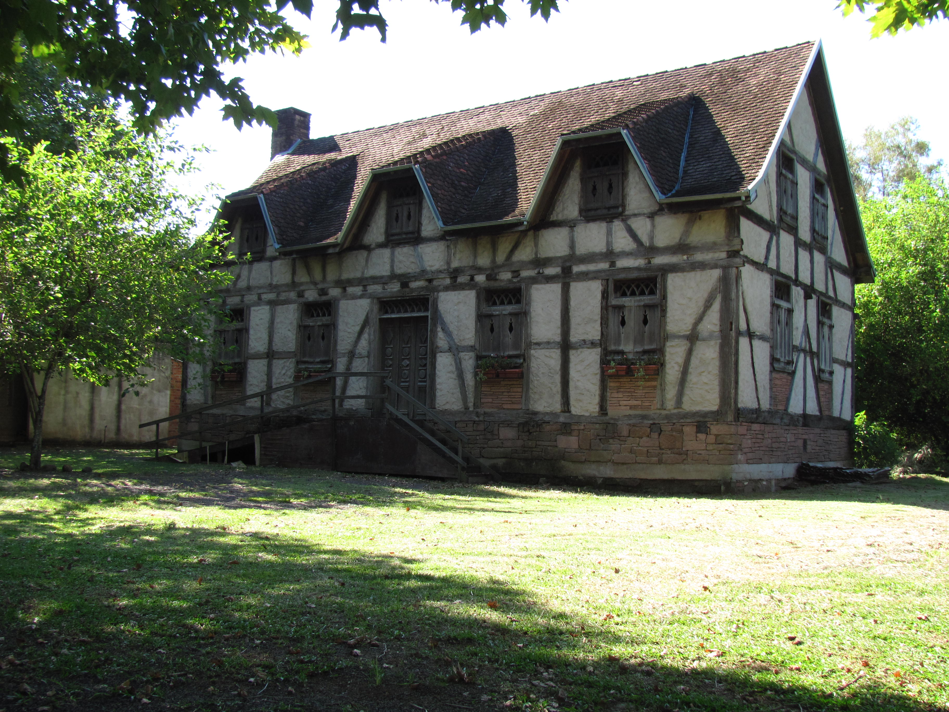 Casa enxaimel em Ivoti